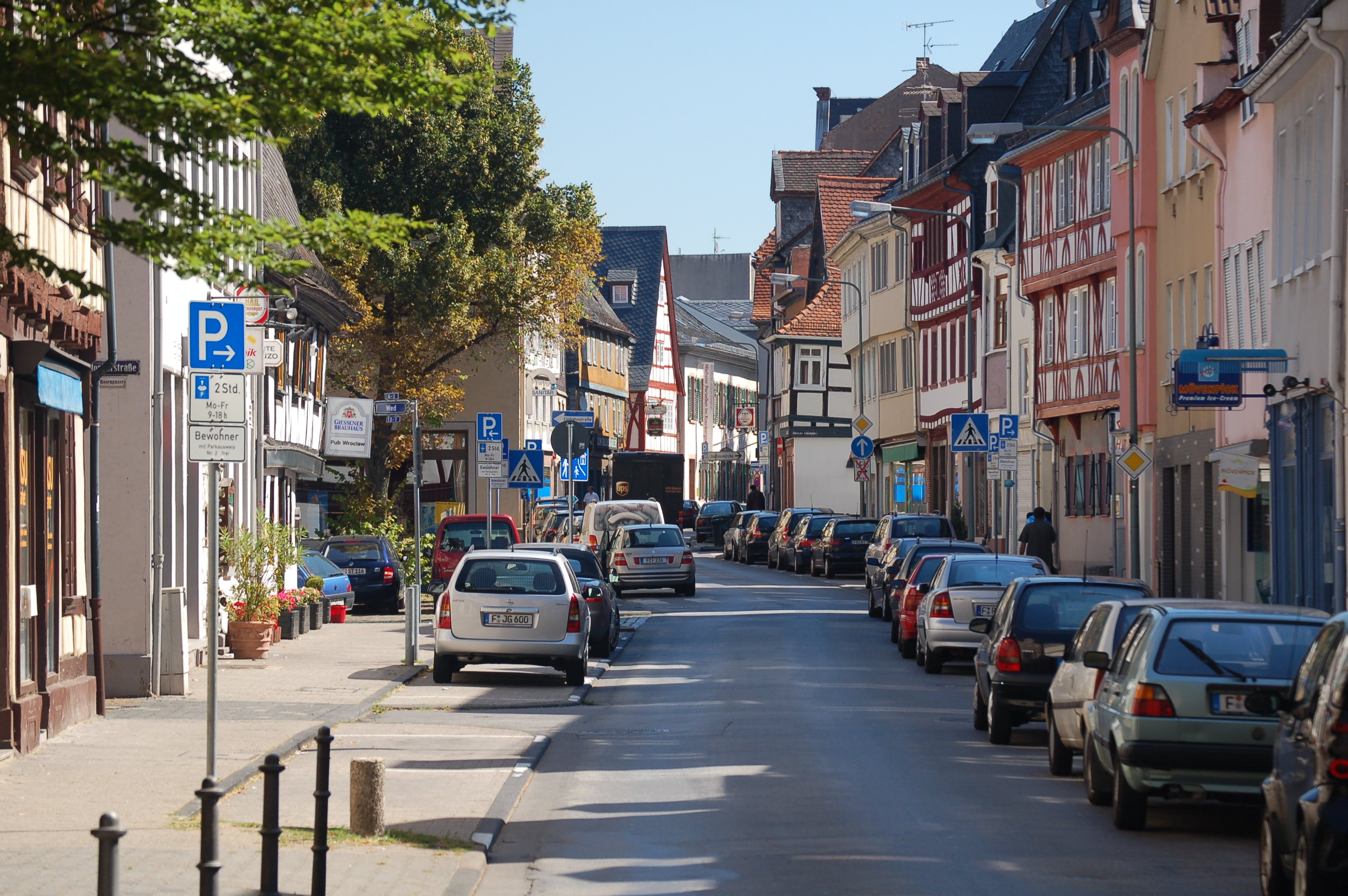 Bolongarostraße in Frankfurt-Höchst zwischen Rosengasse und Kronberger Haus